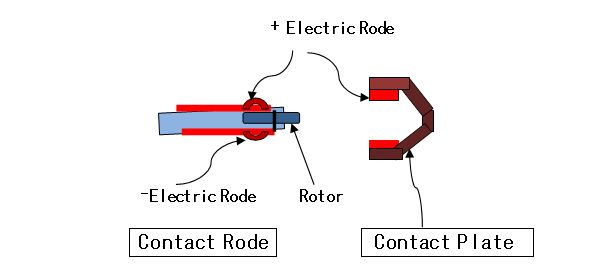 給電装置より車両に給電する接触部